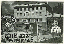 גלוית ראש השנה מבית שיזופולי